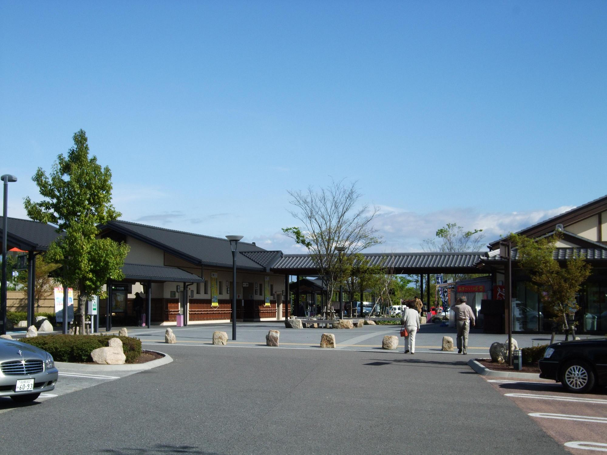 美濃加茂サービスエリア （内回り方面側） 2008.4.19 投稿者が撮影